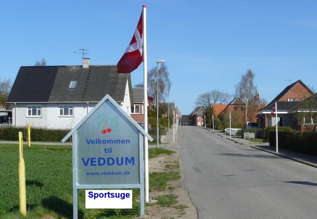 Byport til Veddum.